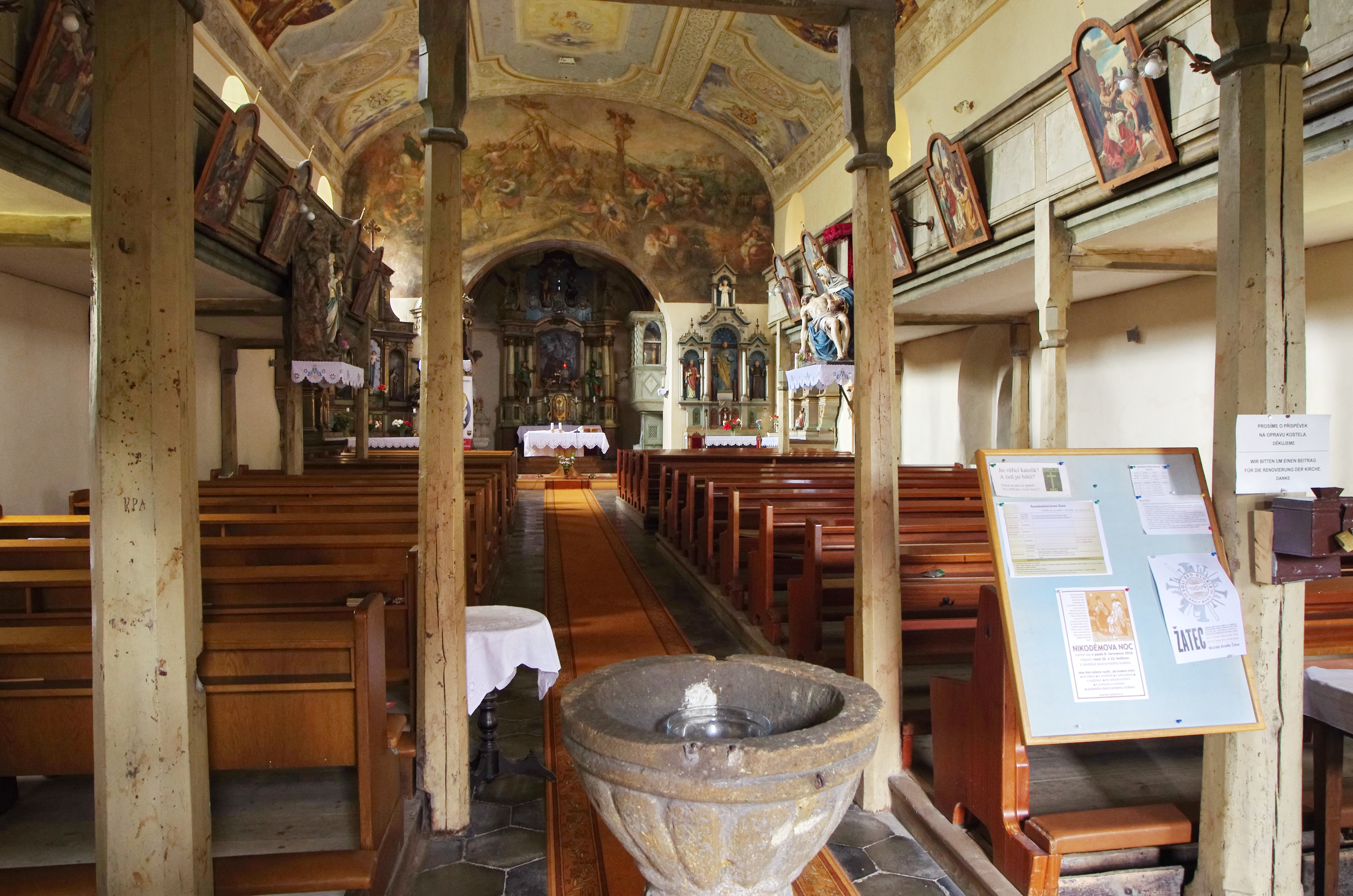 Kostel sv. Ondřeje v Lubech